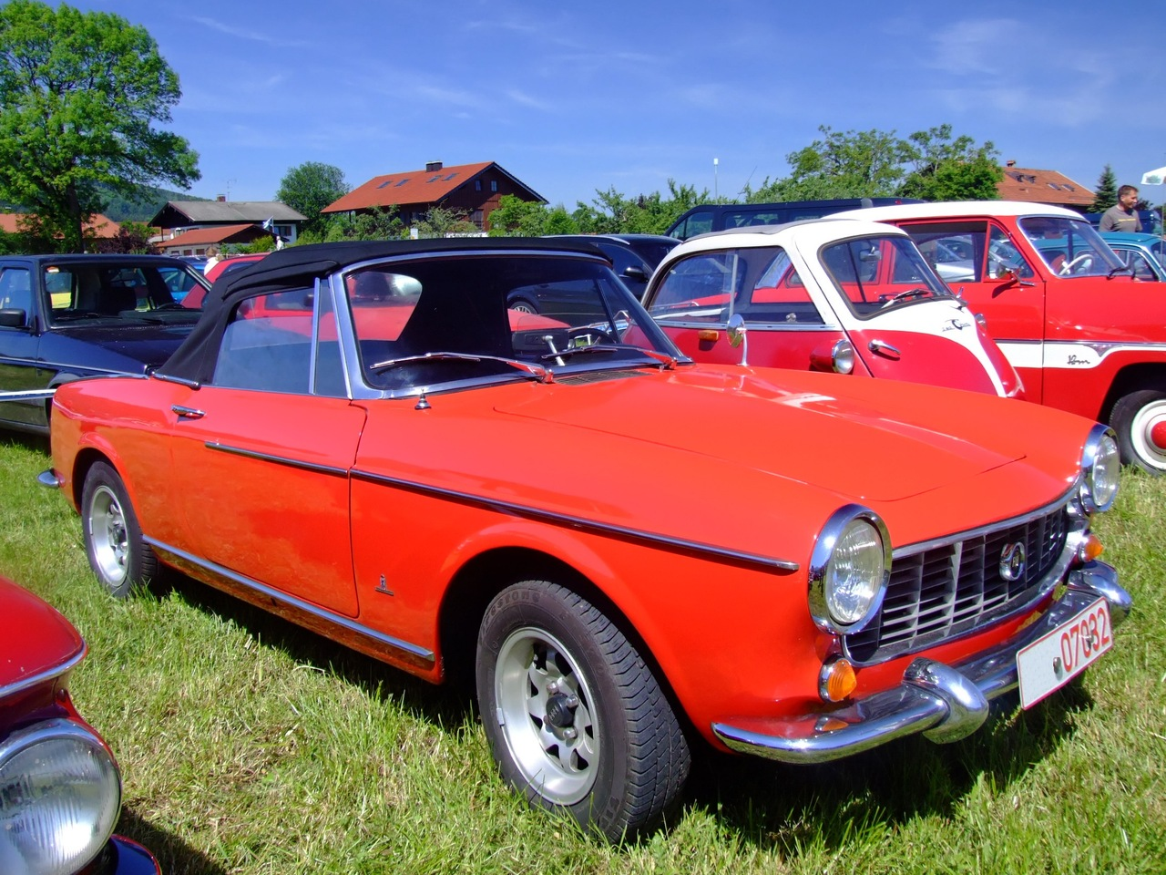 Quelle: selbst fotografiert, 05/2007 Fotograf: Späth Chr.